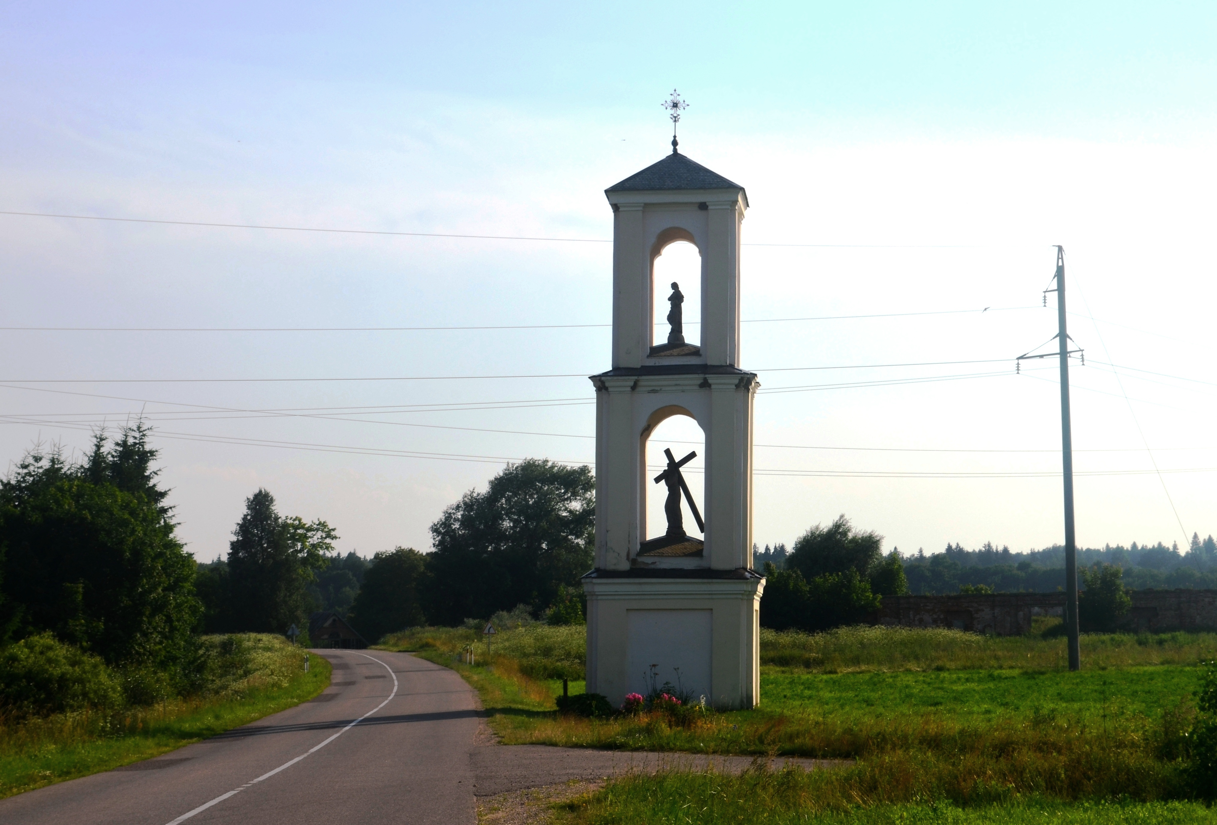 Musninkai, Širvintų raj.